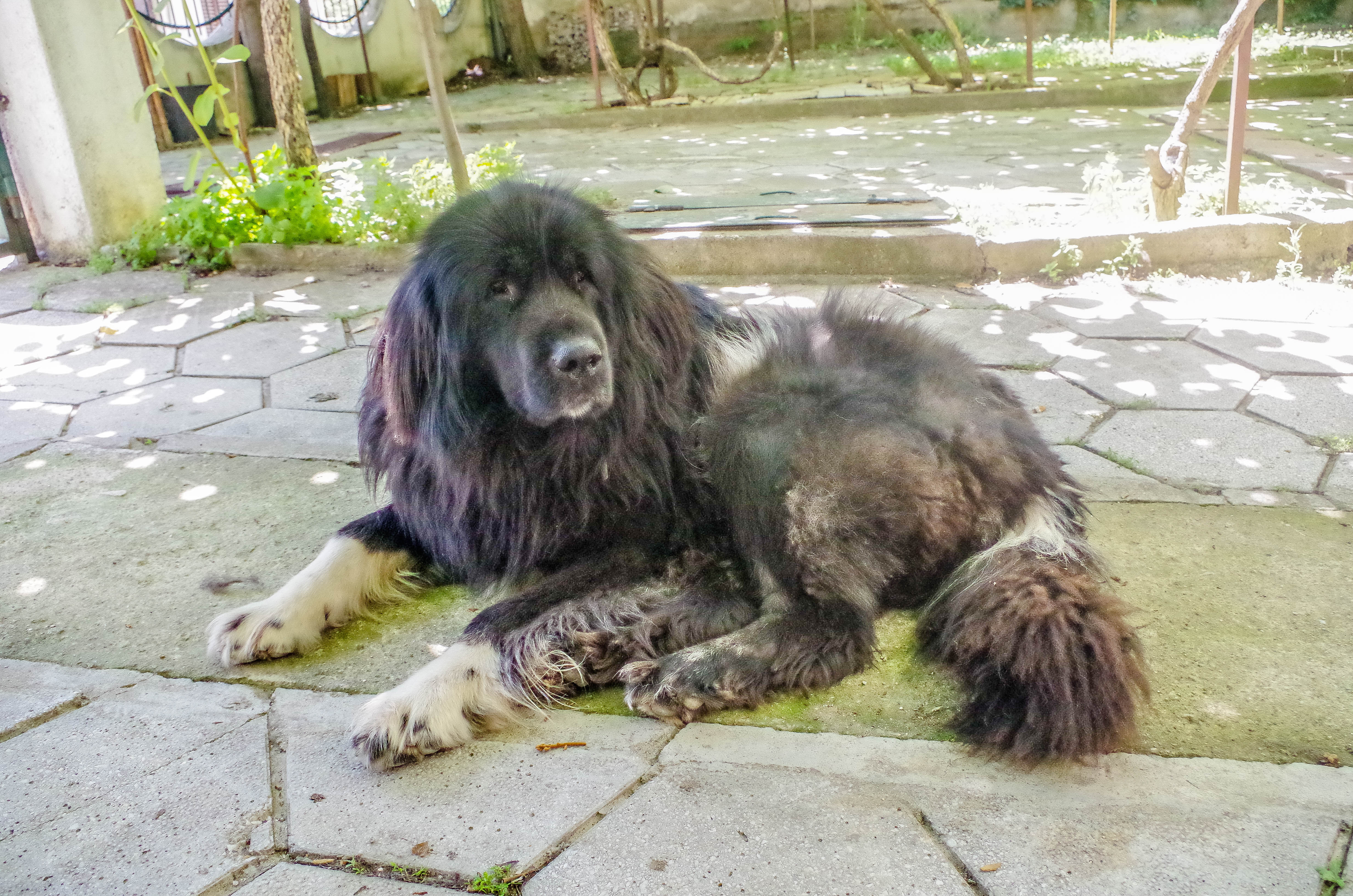 Karaman dog